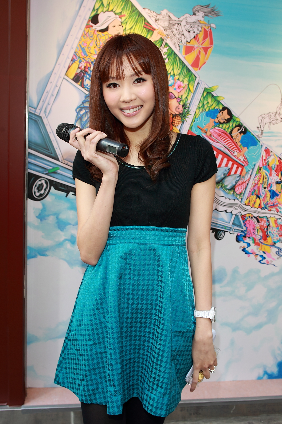 中文（香港）: 銅鑼灣Okinawa新店開幕